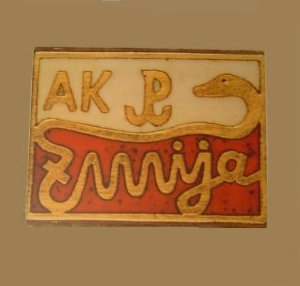 Odznaka pamiątkowa Zgrupowania Żmija